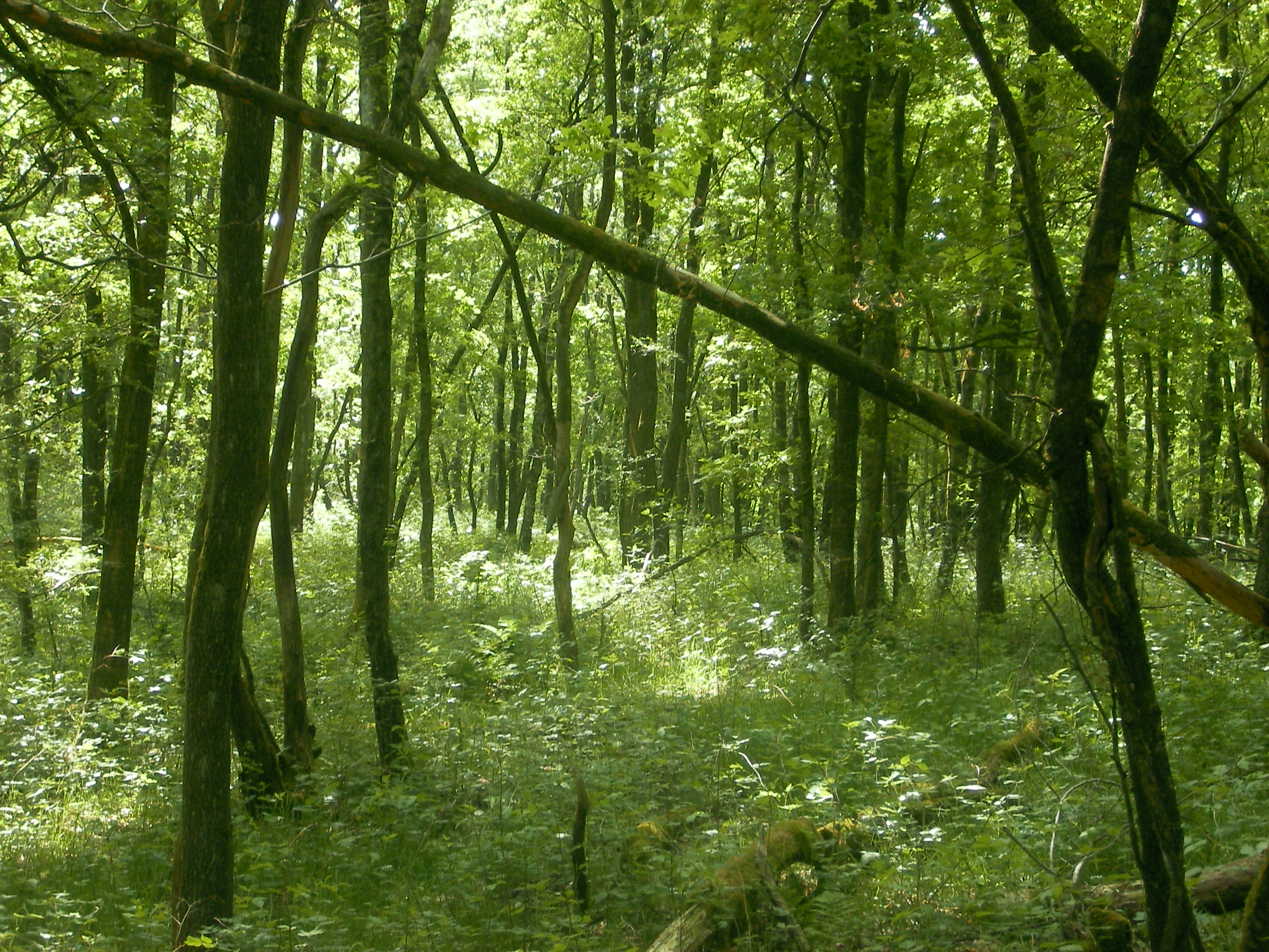 Wald, Südwestfalen